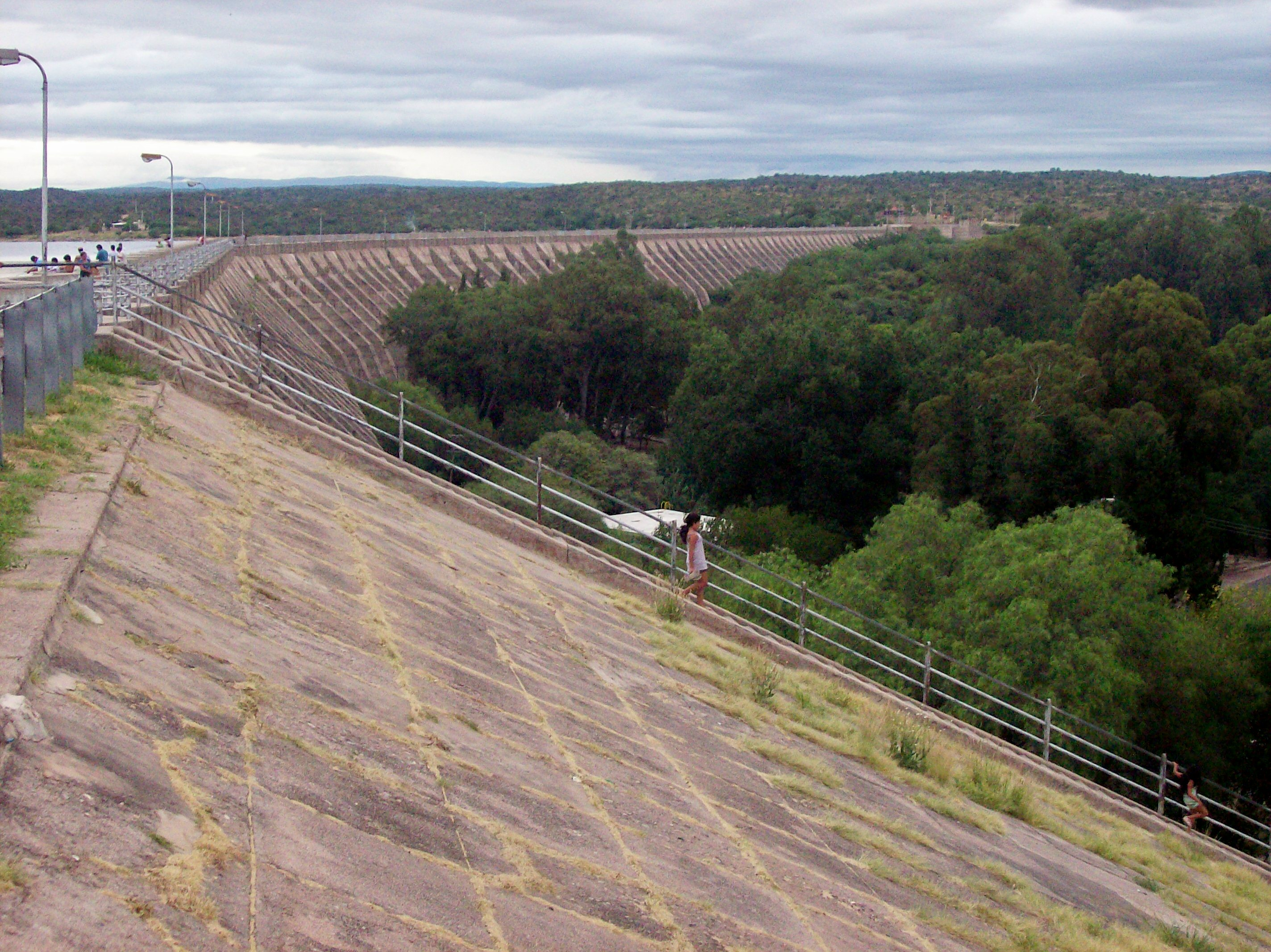 Embalse Cruz del Eje, cerca de la ciudad homónima, en la provincia de Córdoba, Argentina. Puede haber un error de unos 50 m en la ubicación de las coordenadas geográficas